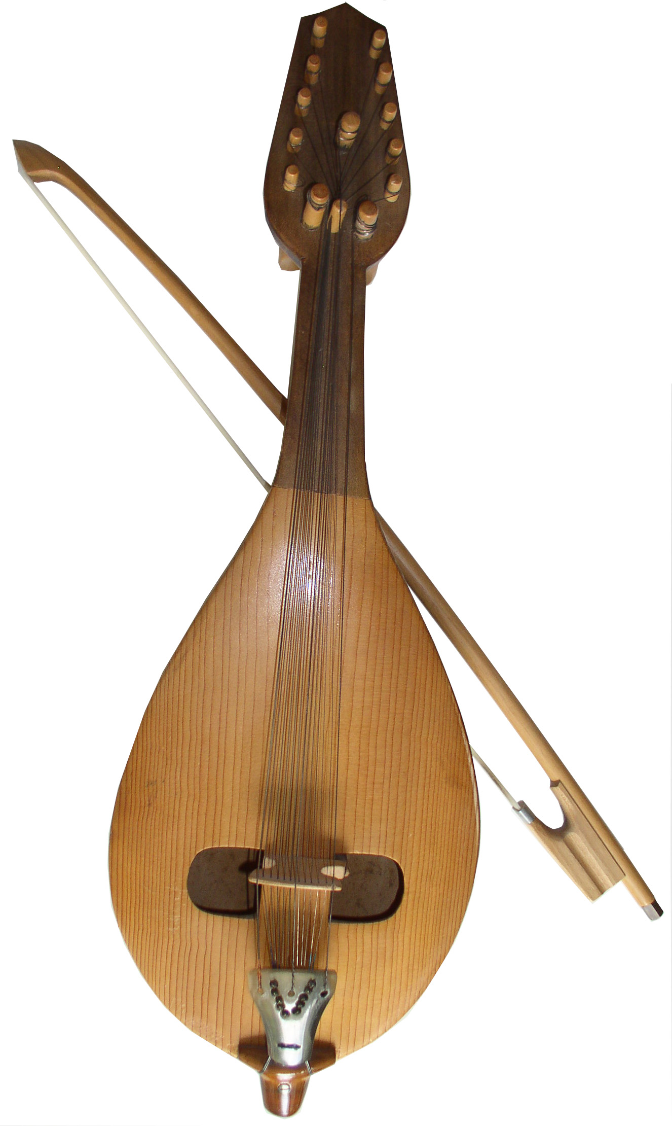 Gdulka/Gadulka Bulkarian knee-violin with bow own picture